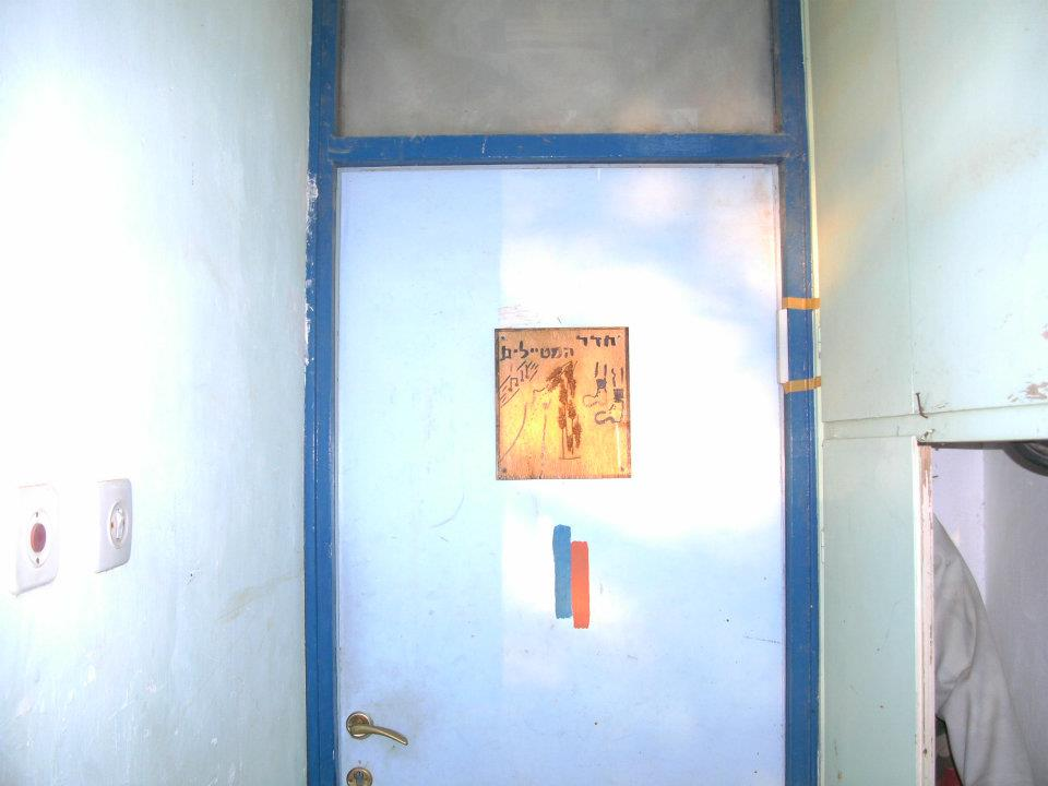 הכניסה לדירת שביל ישראל בהר עמשא 2012